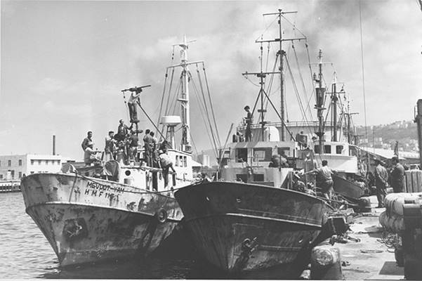 ספינות המכמורת המגוייסות שקמונה מימין ומבואות ים משמאל בנמל חיפה בתקופת ההמתנה למלחמת ששת הימים.